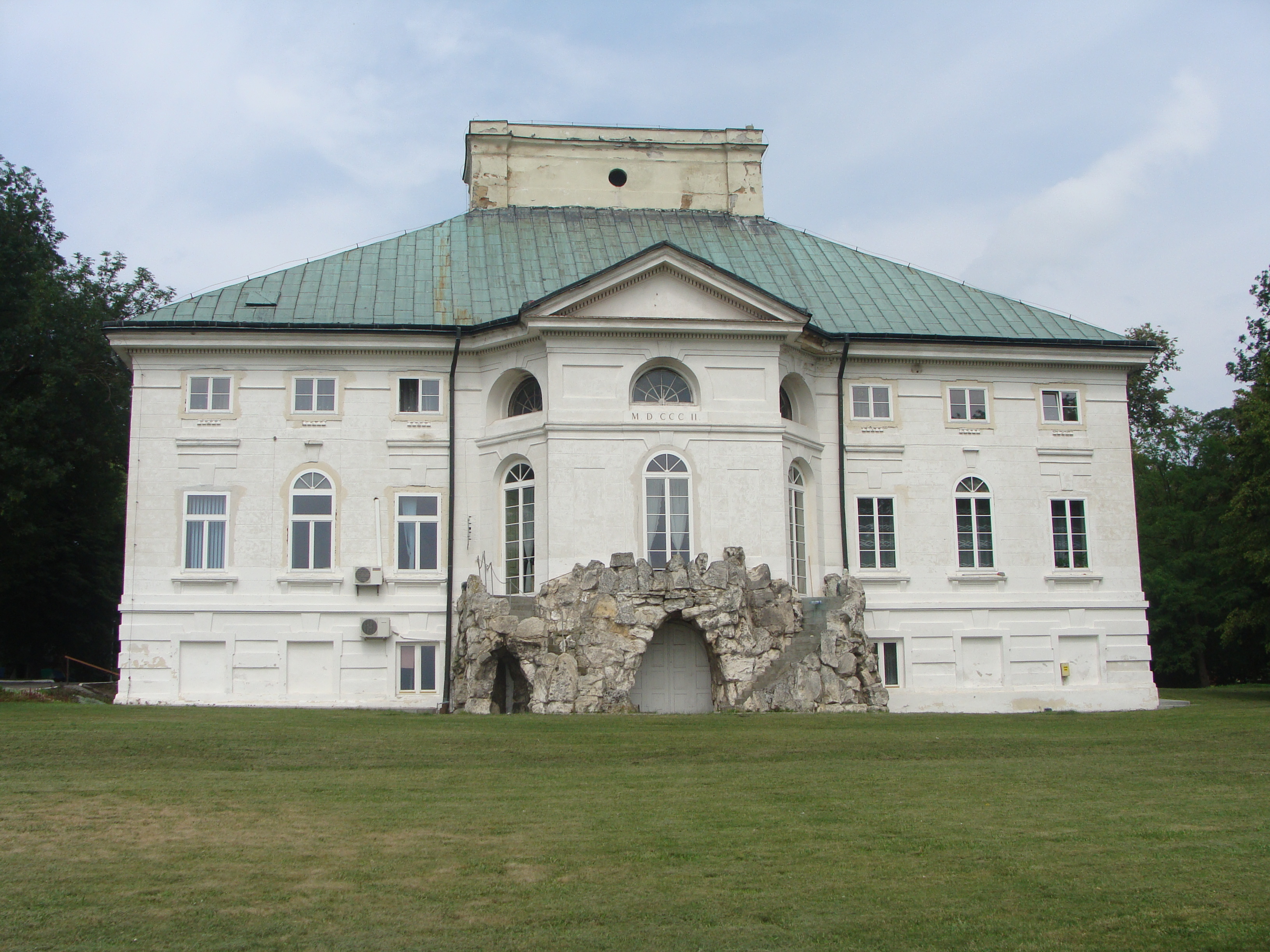 Pałac w Bejscach